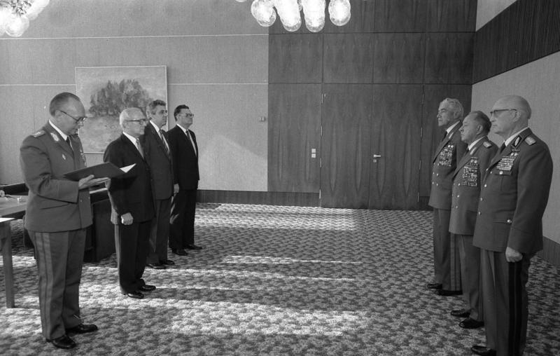 Erich Honecker überreicht Scharnhorst-Orden ADN-ZB/Mittelstädt 3.10.84 Berlin: Beförderungen - Der Generalsekretär des ZK der SED, Erich Honecker, Vorsitzender des Staatsrates und des Nationalen Verteidigungsrates der DDR, überreichte den Scharnhorst-Orden an das Mitglied des Politbüros des ZK der SED und Minister für Nationale Verteidigung, Armeegeneral Heinz Hoffmann (3.v.r.) , sowie an das Mitglied des Politbüros des ZK der SED und Minister für Staatssicherheit, Armeegeneral Erich Mielke (Mitte r.), und beförderte den Minister des Innern und Chef der Deutschen Volkspolizei, Generaloberst Friedrich Dickel (r.), zum Armeegeneral. Anwesend waren Egon Krenz (3.v.l.), Mitglied des Politbüros und Sekretär des ZK der SED, Generaloberst Fritz Streletz (l.), Stellvertreter des Ministers für Nationale Verteidigung. Abgebildete Personen: Mielke, Erich: Minister für Staatssicherheit, Armeegeneral, Politbüro des Zentralkomitees (ZK) der SED, DDR (GND 118977490) Honecker, Erich: Staatsratsvorsitzender, Generalsekretär des ZK der SED, DDR (GND 118553399) Hoffmann, Heinz: Minister für Nationale Verteidigung, Mitglied des ZK der SED, DDR Dickel, Friedrich: Innenminister, Chef der Volkspolizei, ZK der SED, DDR Krenz, Egon: Vorsitzender der FDJ, Generalsekretär des ZK der SED, Staatsratsvorsitzender, DDR Streletz, Fritz: Generaloberst, stellvertretender Minister für Nationale Verteidigung, DDR (GND 123442362)